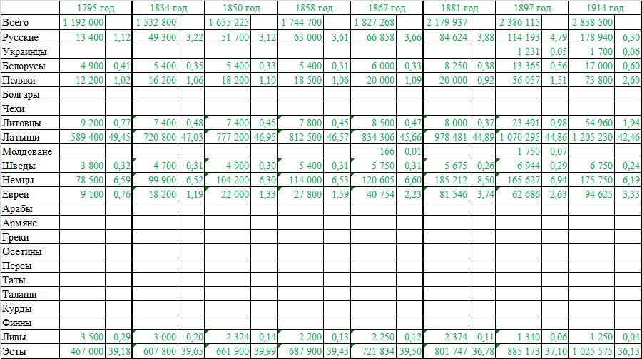 Динамика населения губерний Прибалтийского края с 1795 по 1914 год